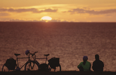 Coucher de soleil–Îles-de-la-Madeleine / Sunset of Magdalen Island (Québec, Canada)